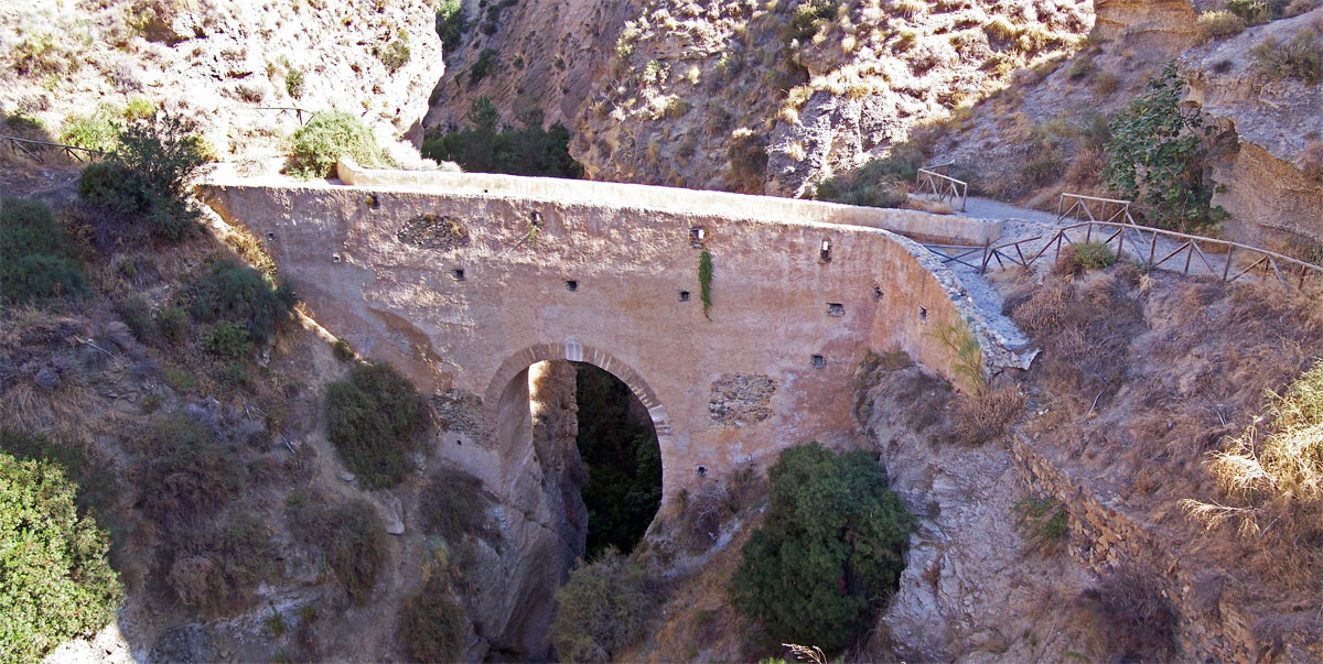 Vista del puente de Tablate por su lado sur